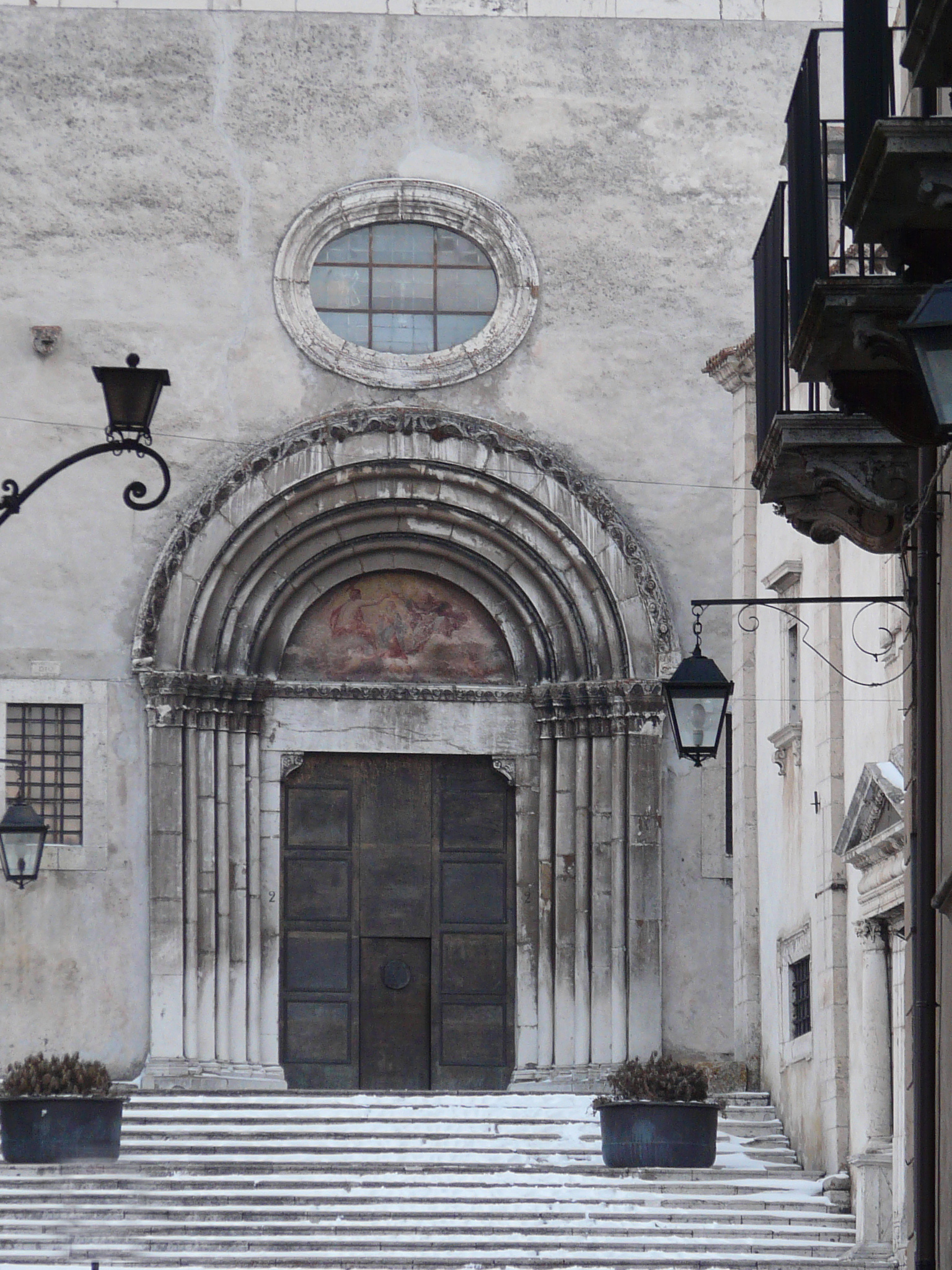 Chiesa principale di Pescocostanzo